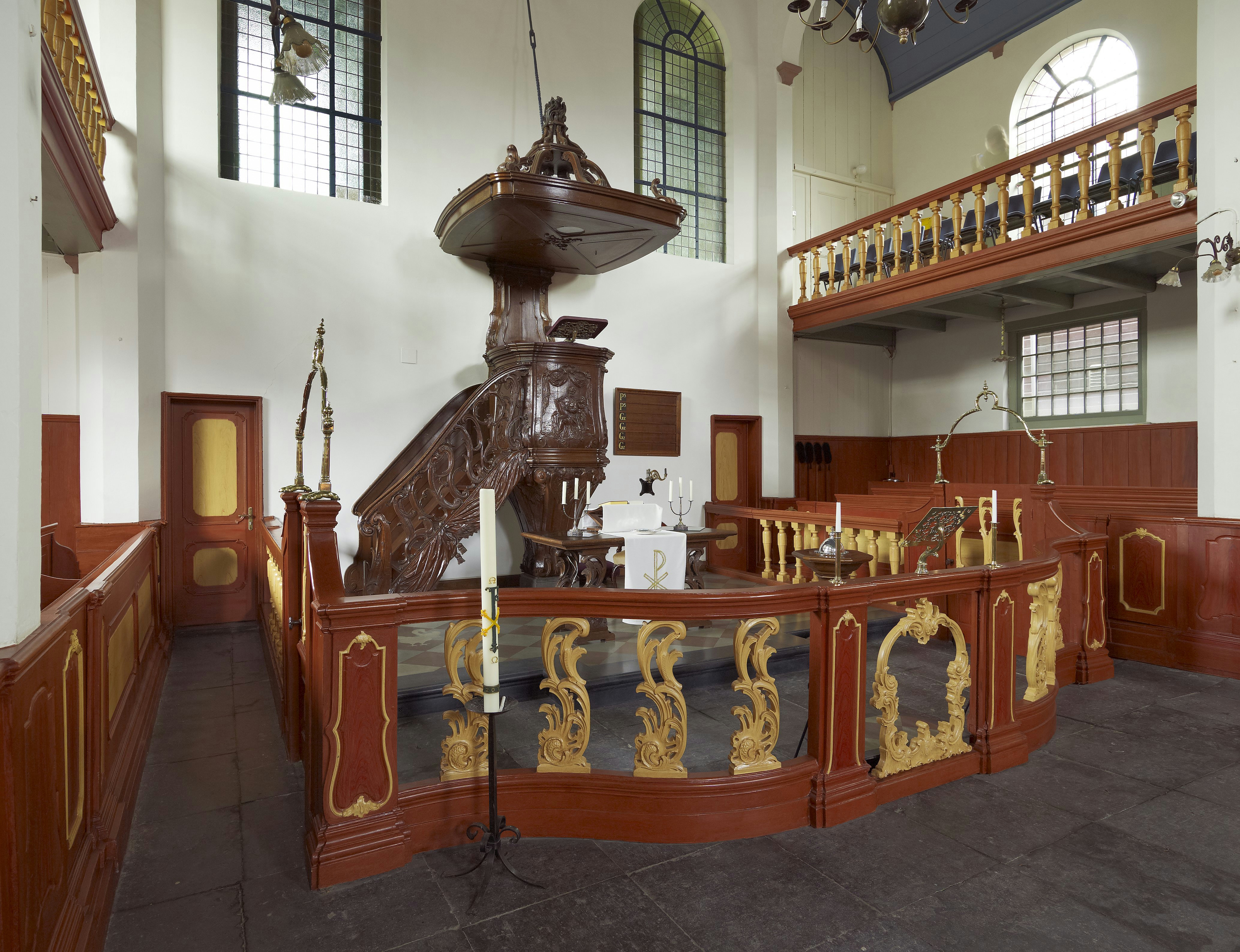 Evangelische Lutherse Kerk: Interieur. overzicht preekstoel